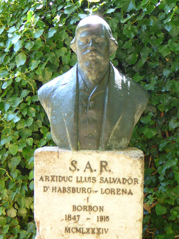 Bust de l'arxiduc Lluís Salvador d'Àustria als jardins de l'ajuntament de Valldemossa (Mallorca).